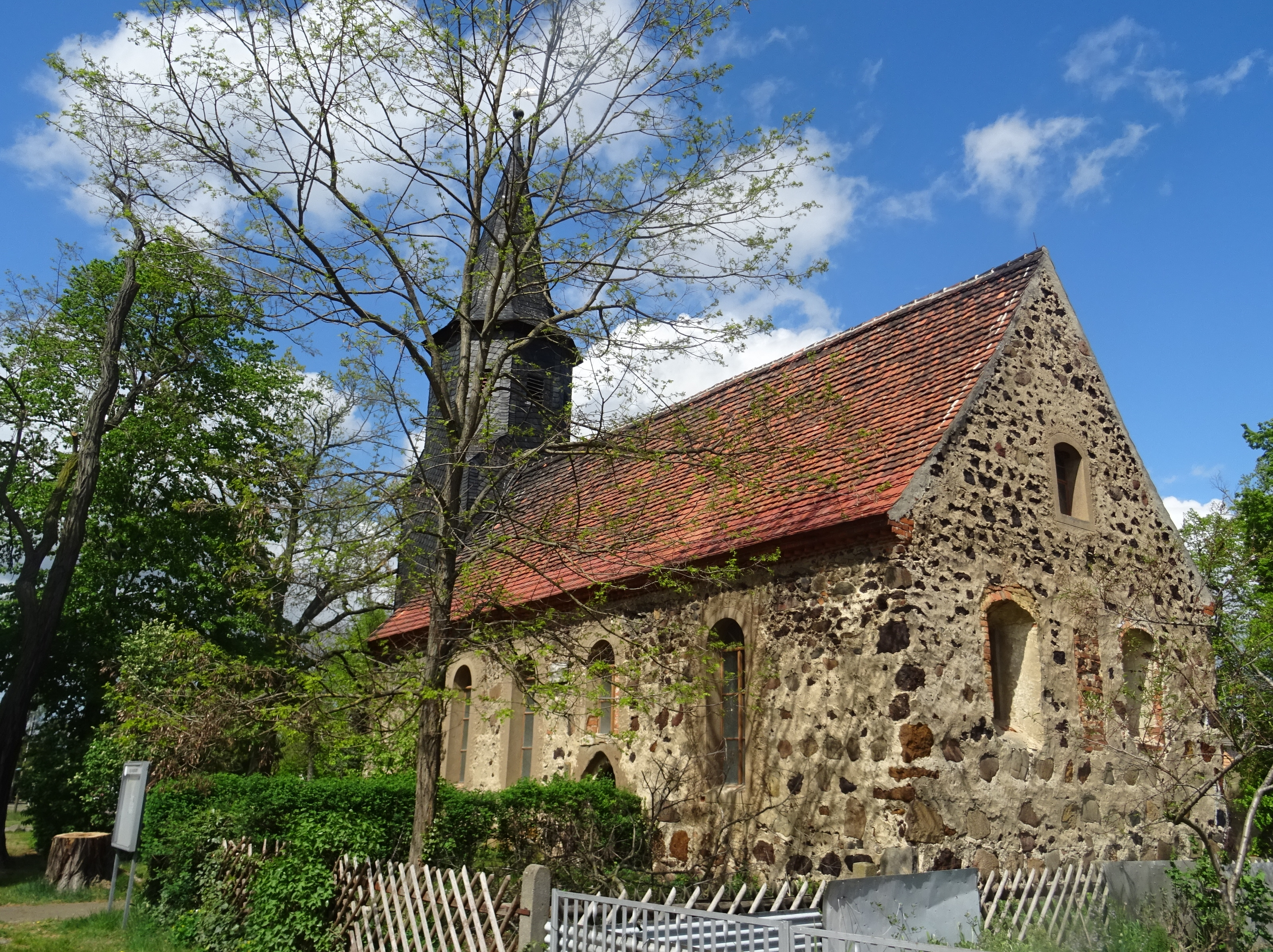 Dorfkirche Knippelsdorf,Ansicht von Südosten